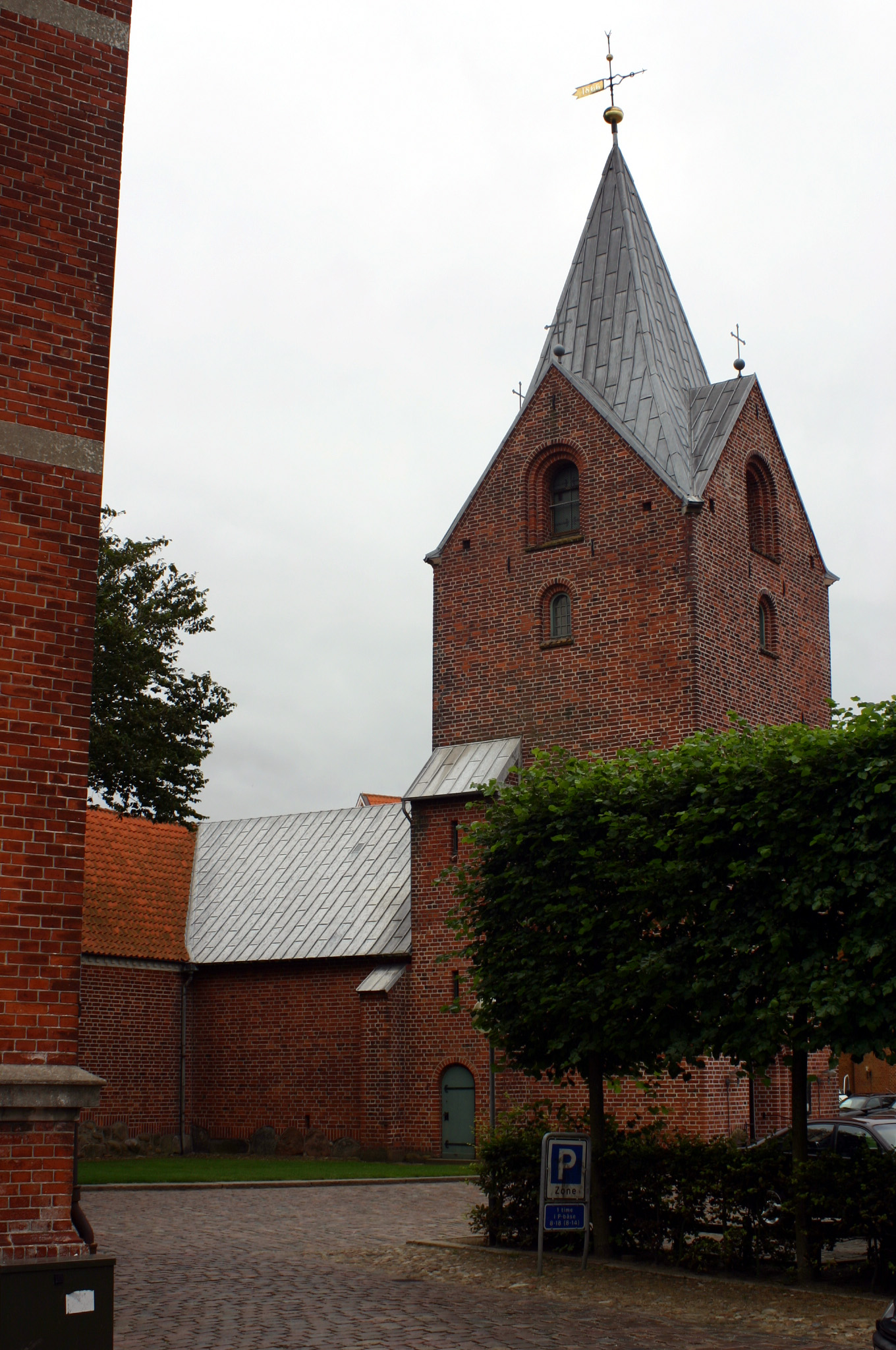 Ringkøbing Church (Ringkøbing Kirke) in Ringkøbing, Denmark